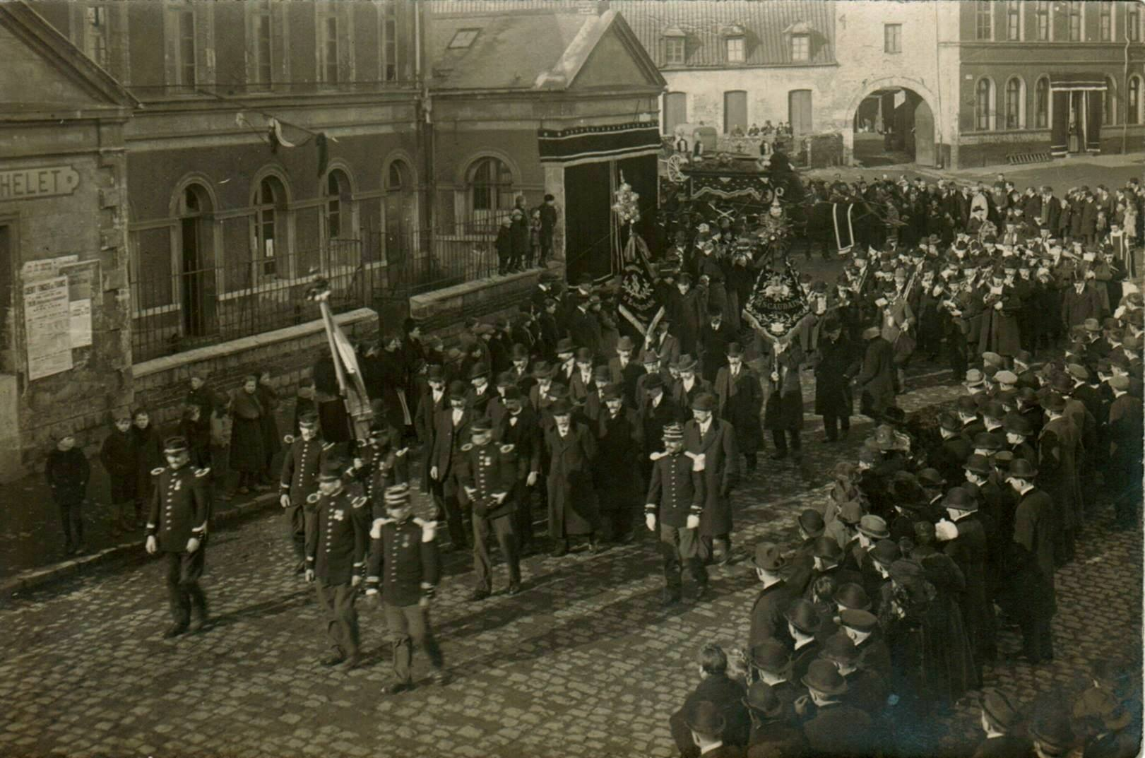 Fosse de Roeulx catastrophe 19-01-1920